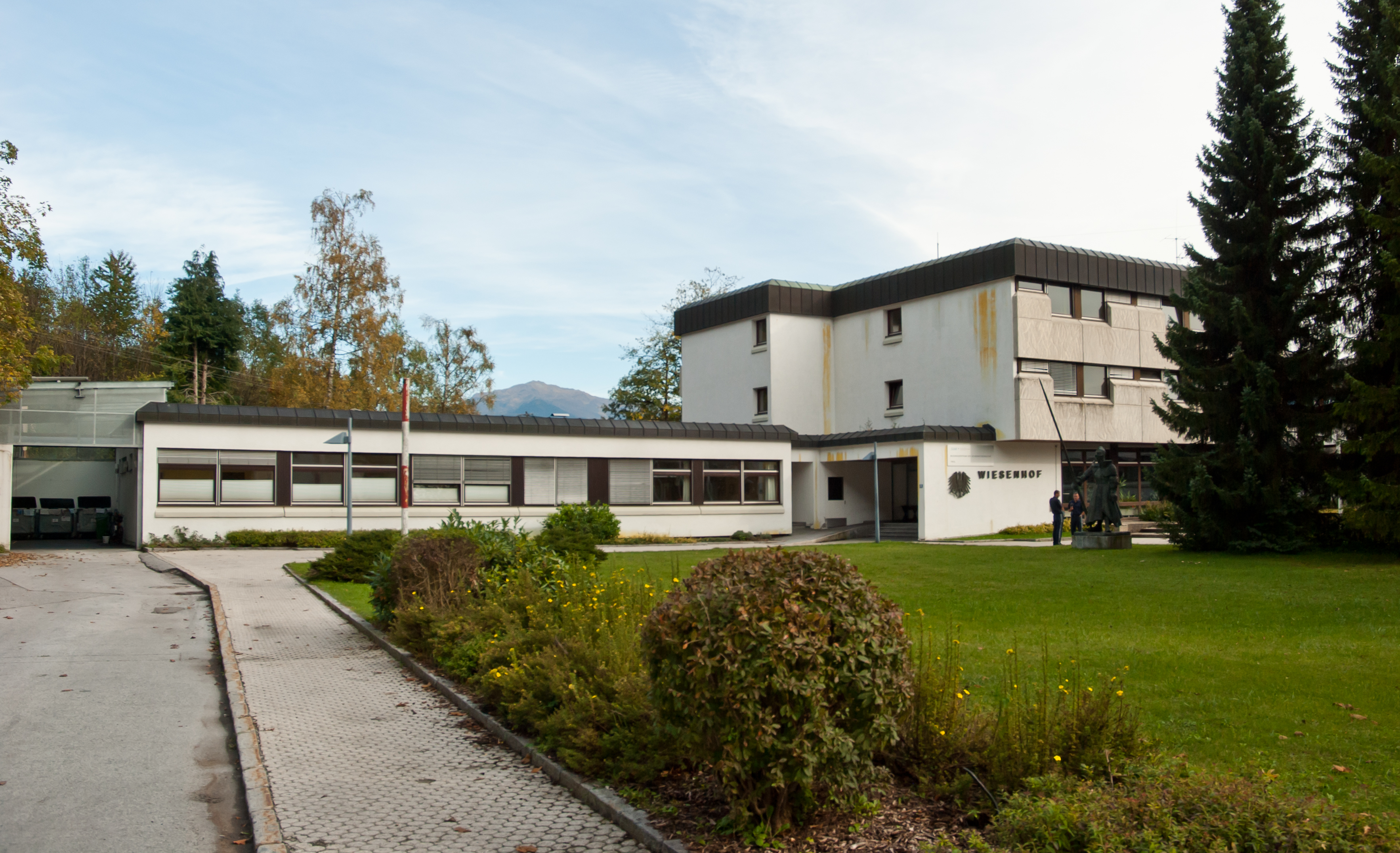 Bildungszentrum Tirol (Wiesenhof) der Sicherheitsakademie (.SIAK) des österreichischen Bundesministeriums für Inneres. Das Bildungszentrum (umgangssprachlich Polizeischule) für das Bundesland Tirol in Absam.